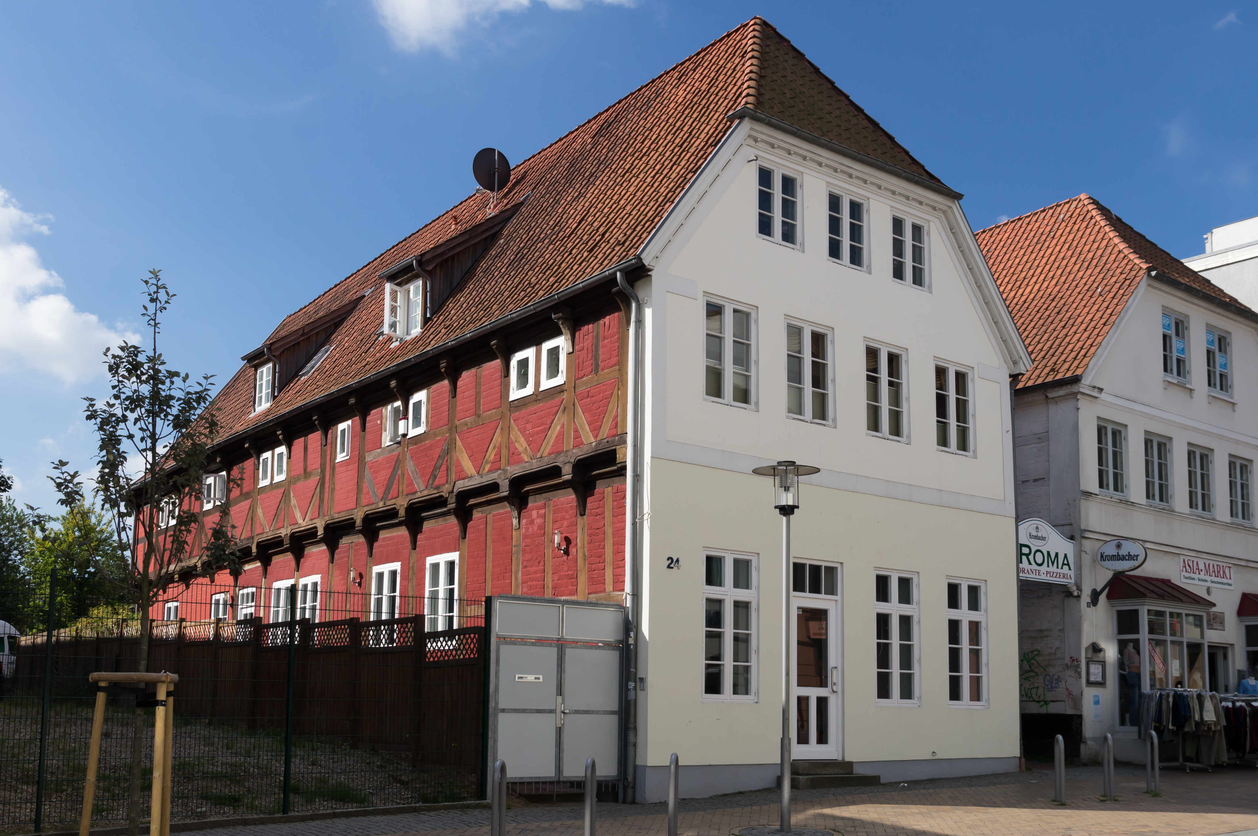 Flensburg-Altstadt; Angelburger Straße 24; Denkmal-Nr. 5; Wohn- und Geschäftshaus